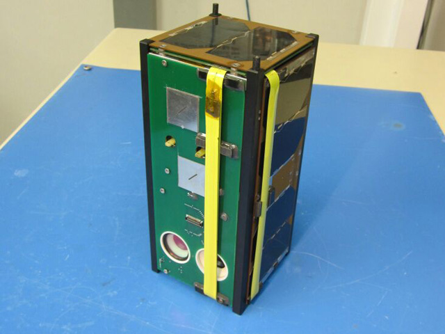 AntelSat antes de su lanzamiento en un cohete Dnepr.